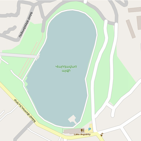 Վարդավառի լճի քարտեզ